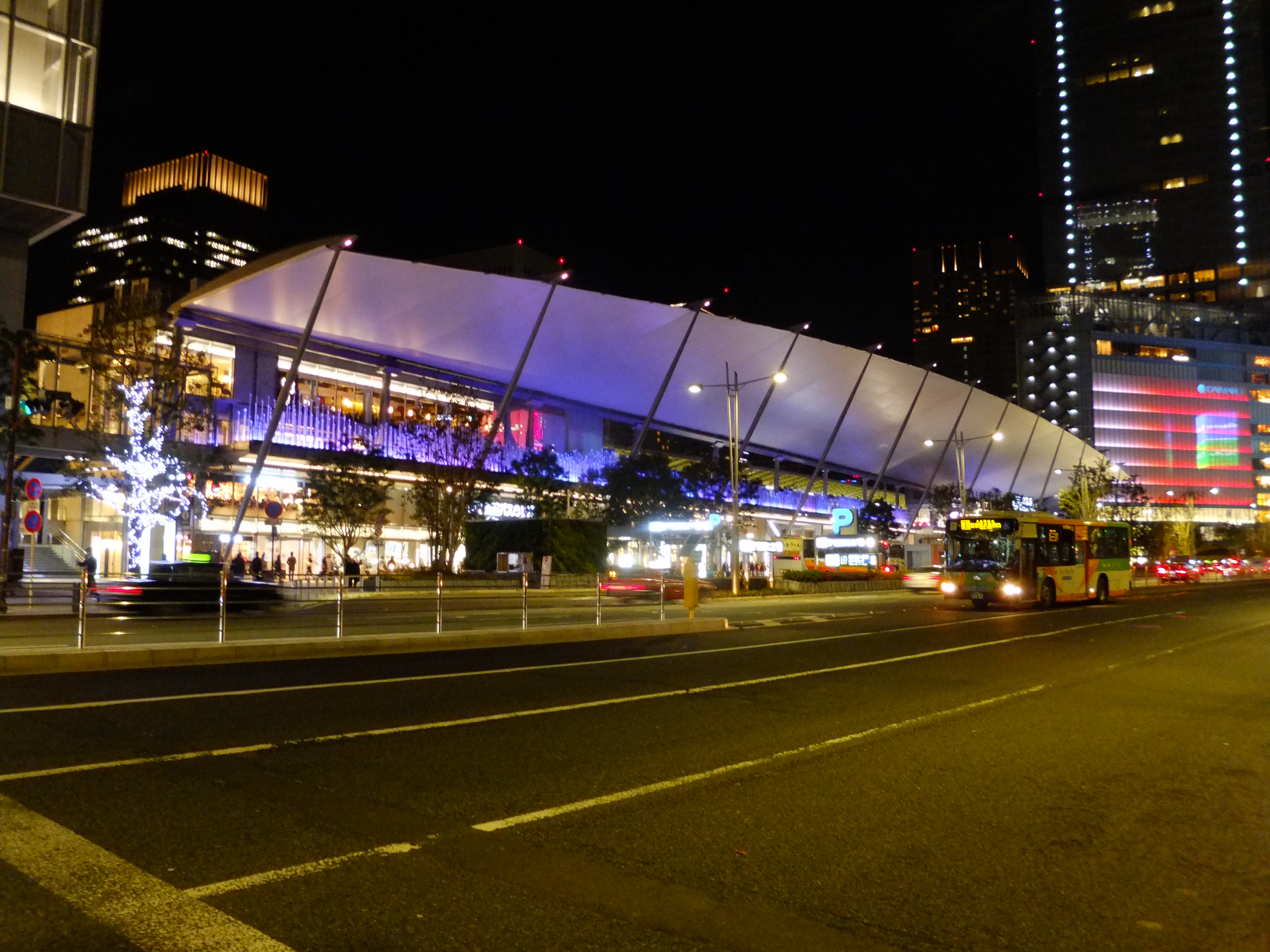 東京駅八重洲口、グランルーフ（2014年12月）。東京駅開業100周年記念イベントの一環として、イルミネーションイベント「Tokyo Colors」が開催されている。